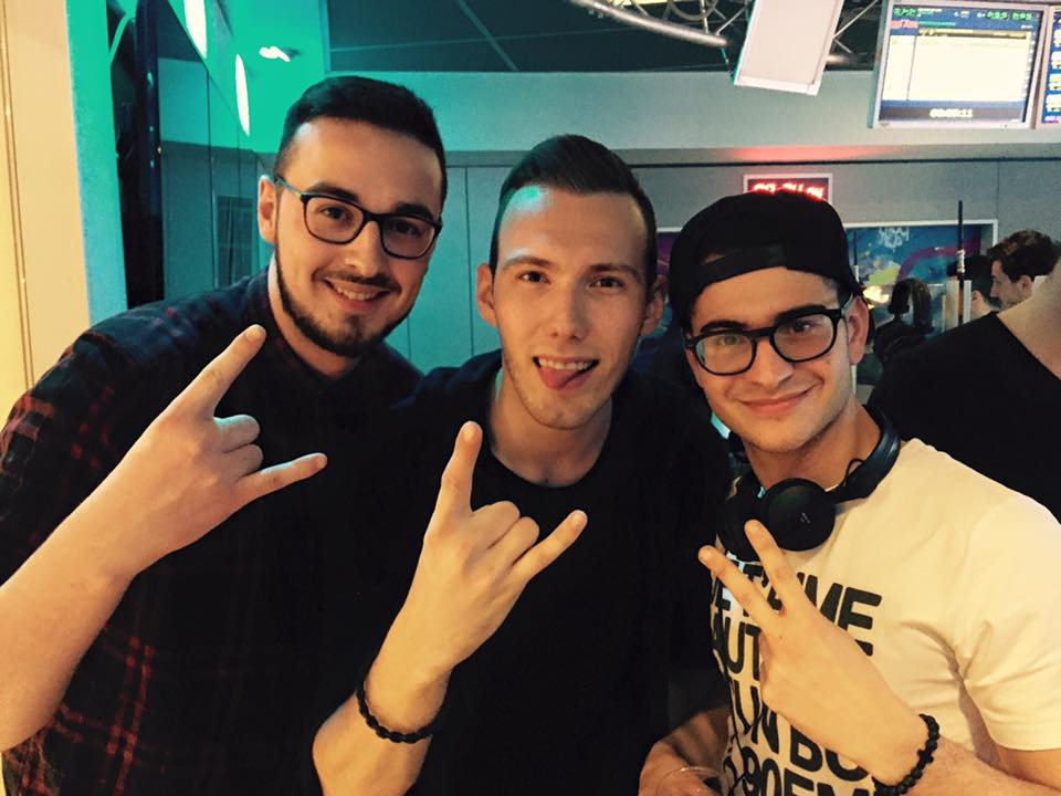 Thomas Feelman, Tom Swoon et Antoine Delvig (de gauche à droite) dans le studio de Fun Radio France